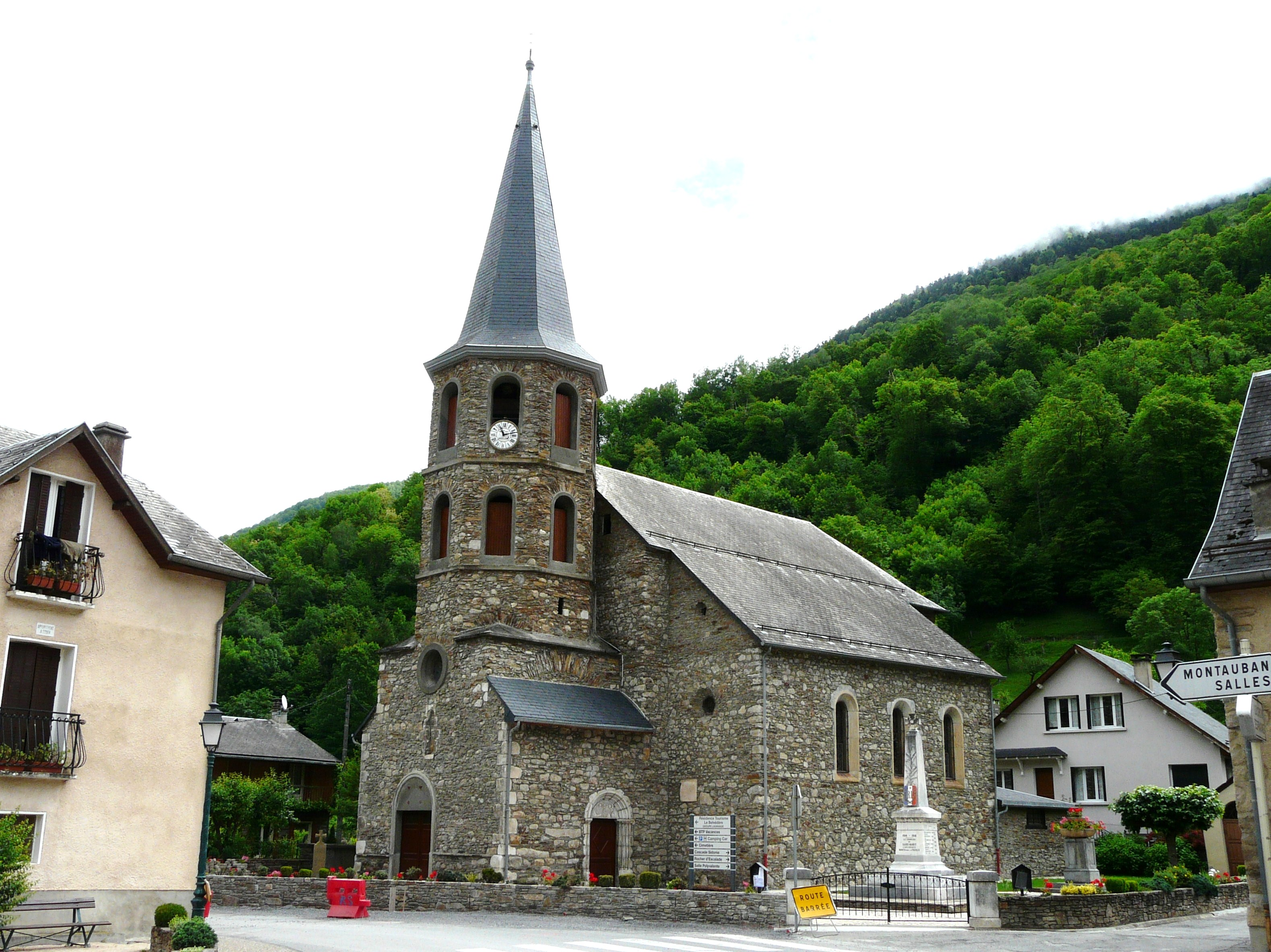 L'église de Saint-Mamet, Haute-Garonne, France.